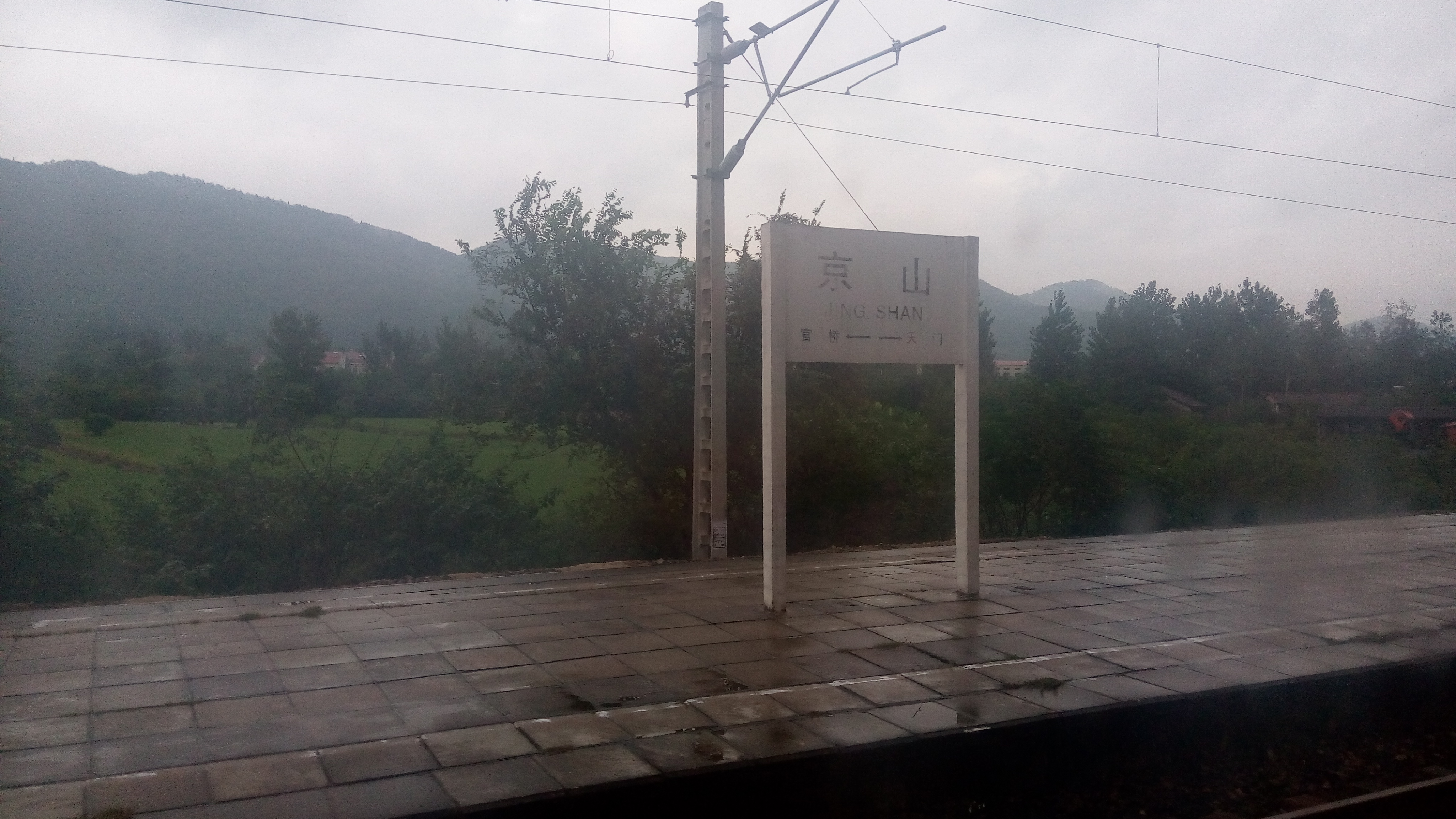 京山站站牌